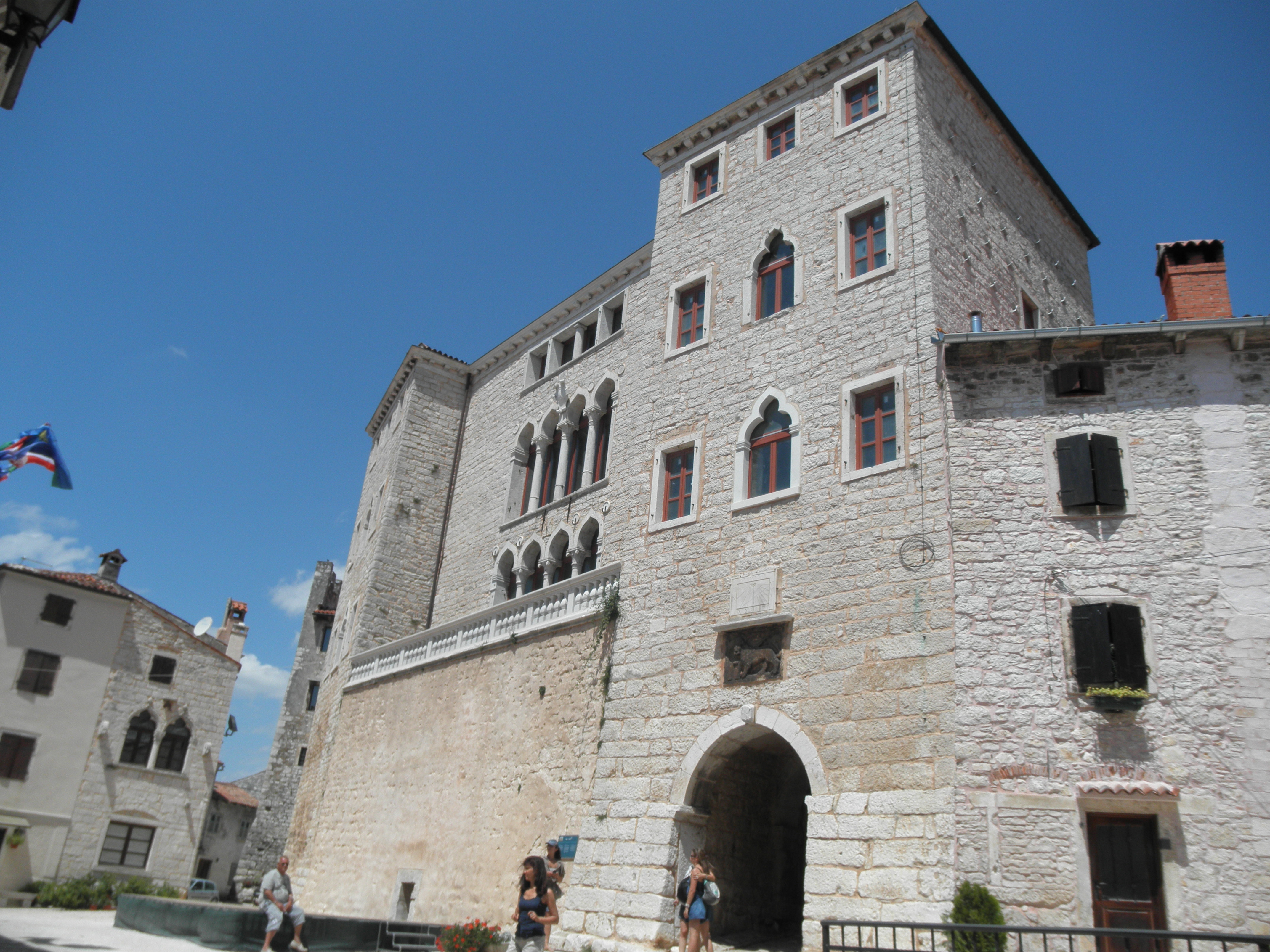 Pordega turo de la kastela palaco Bembo en Bale - Valle